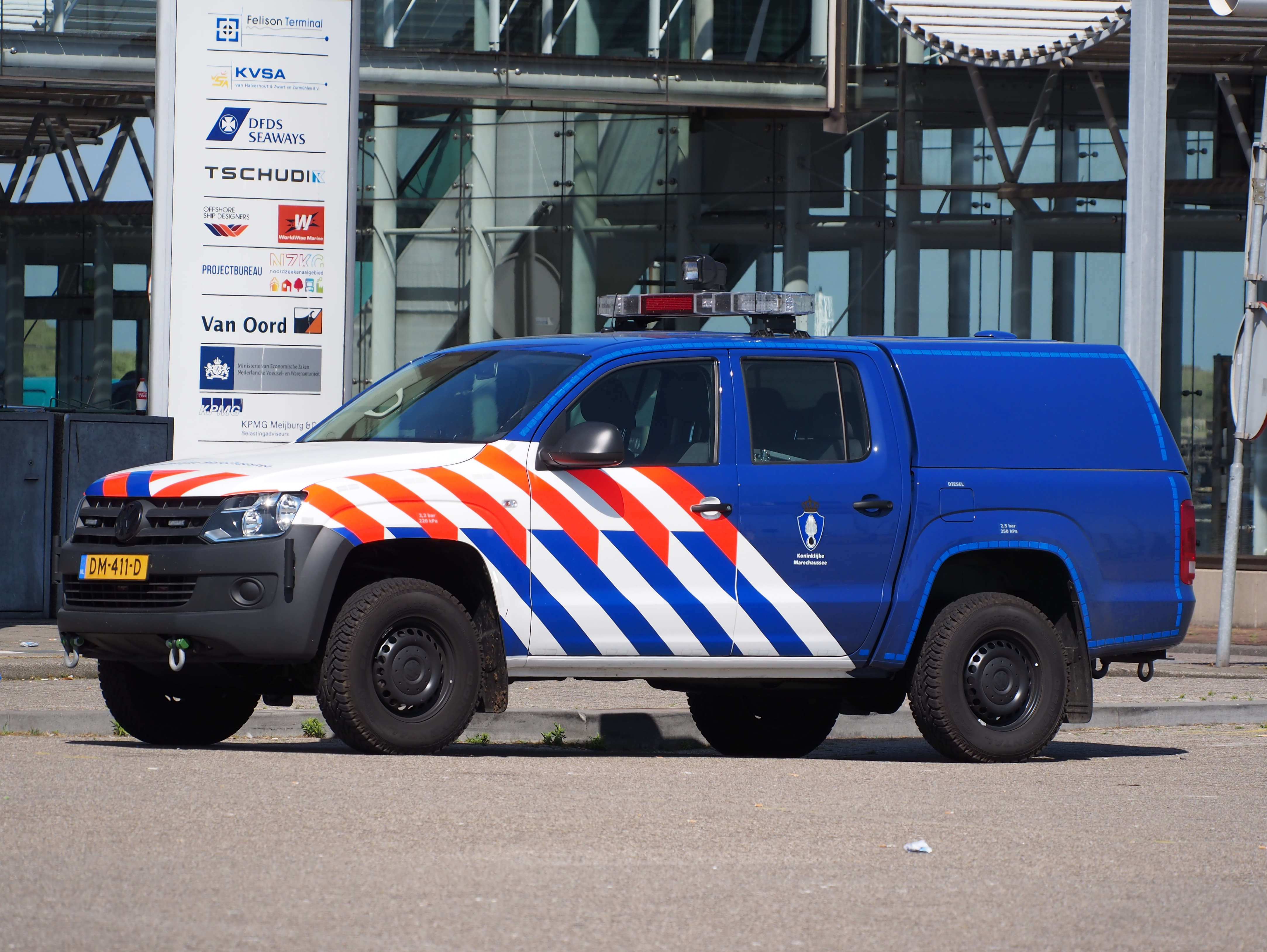 Volkswagen Koninklijke Marechaussee, IJmuiden.